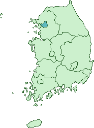 서울의 지도 , The colors of the original file is altered.